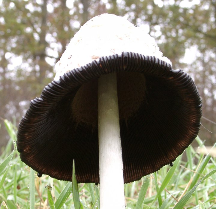 Ein ausgewachsener Schopftintling (Coprinus comatus) von innen